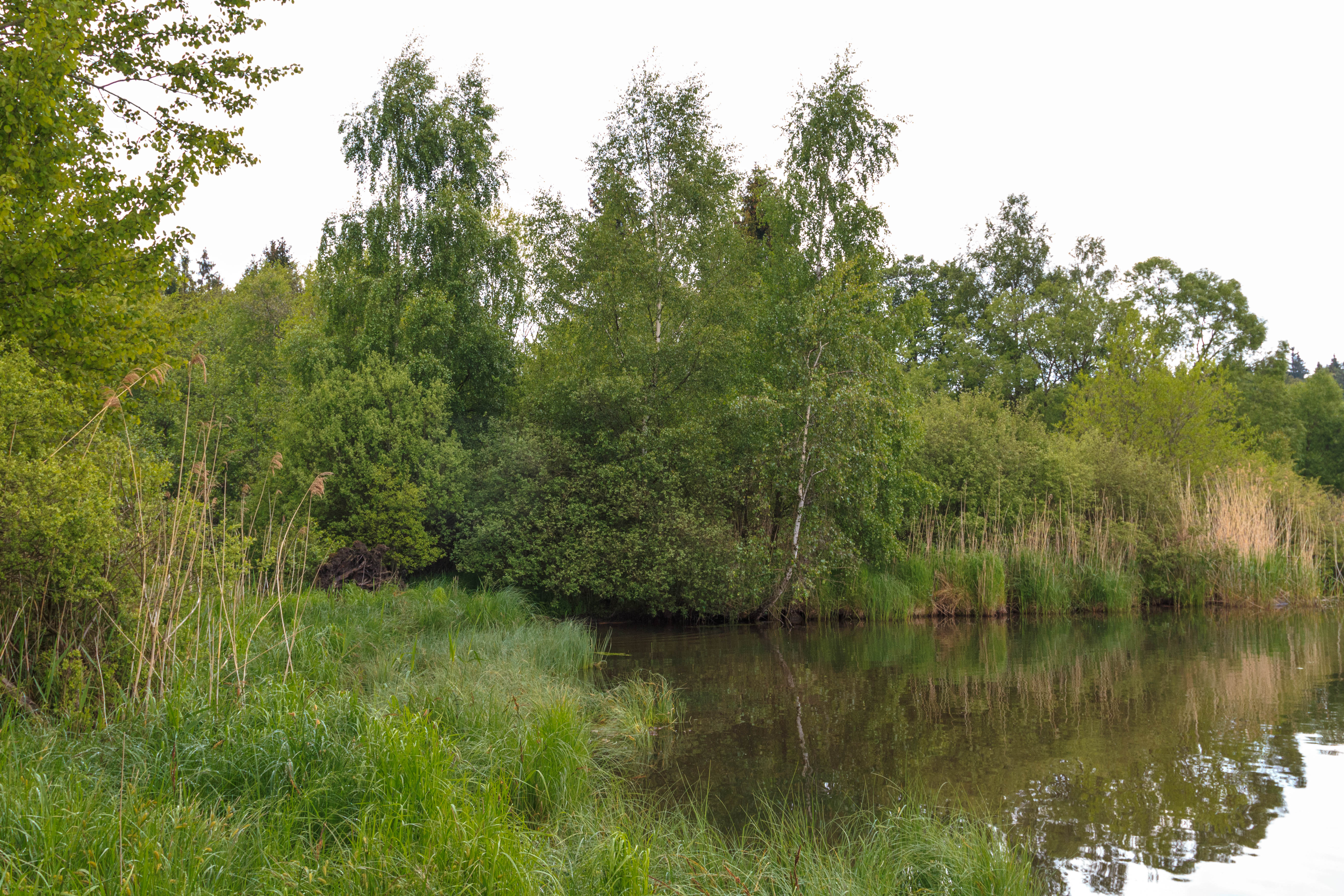 Přírodní rezervace Strádovka Project: Chráněná území.